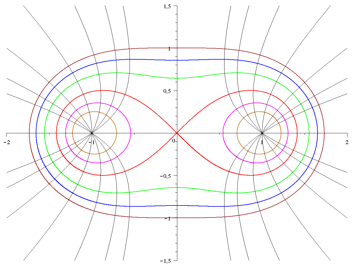 Représentation graphique d'ovales de Cassini comme courbes orthogonales d'une famille d'hyperboles équilatères